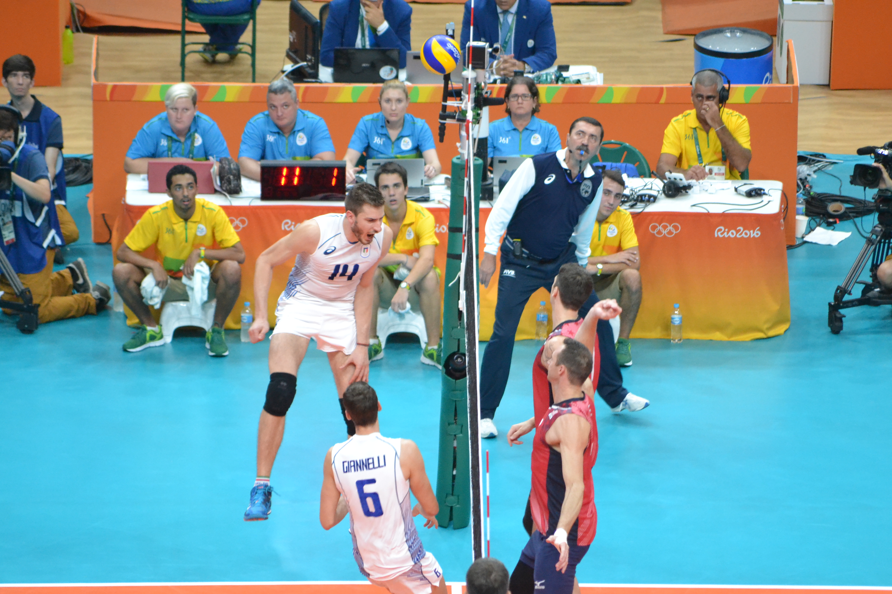 Piano Mateo vibra ao furar o bloqueio americano